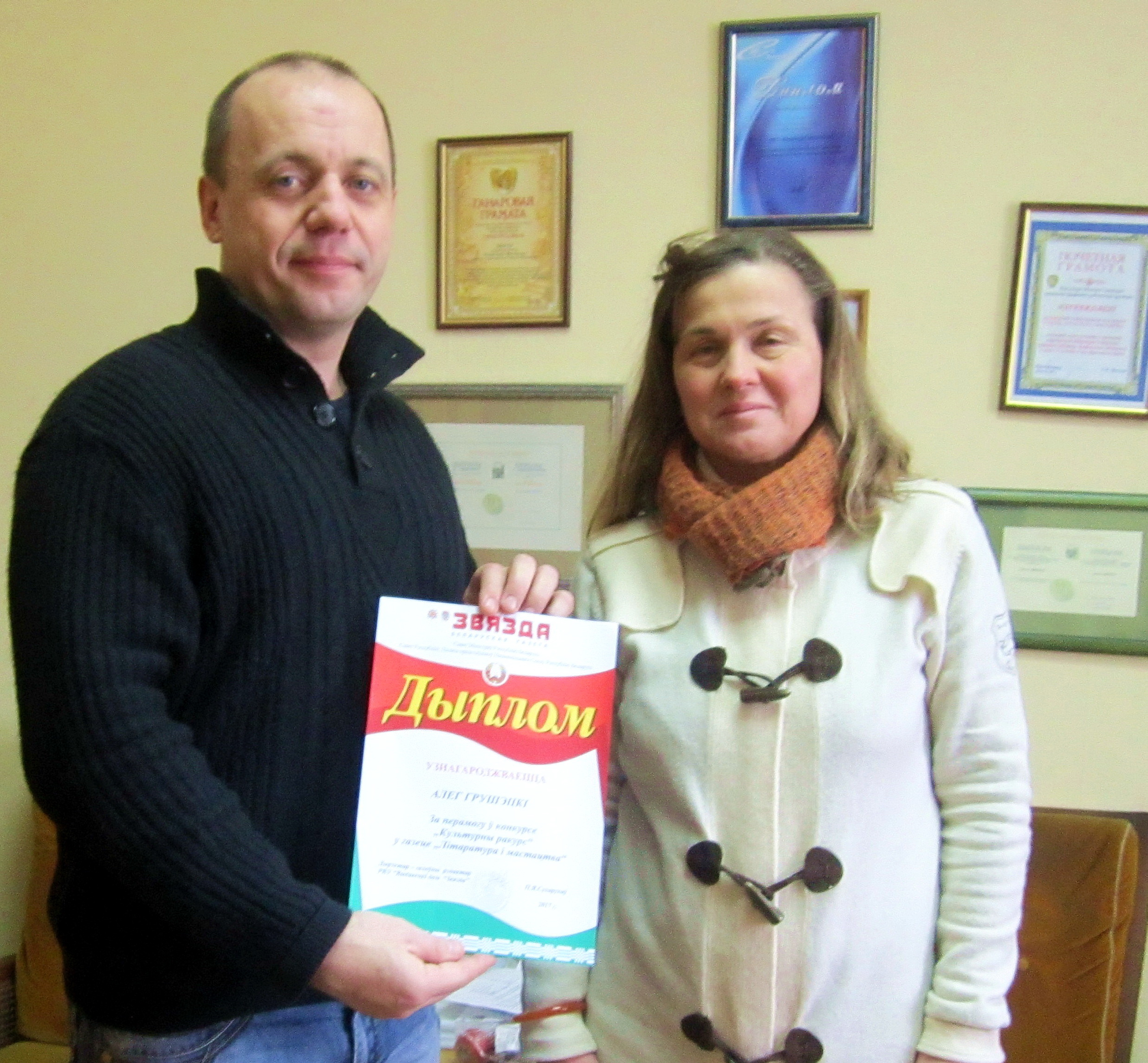 Узнагароджанне дыпл. за І месца ў конк. «Культурны ракурс» газ. «Літаратура і мастацтва». Алег Грушэцкі разам з галоўным рэдактарам газ. «Літаратура і мастацтва» Ларысай Цімошык